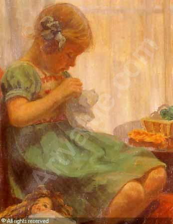 AAE Arvid,Interiør med lille pige, der syr,Nellemann & Thomsen,Viby J. Århus